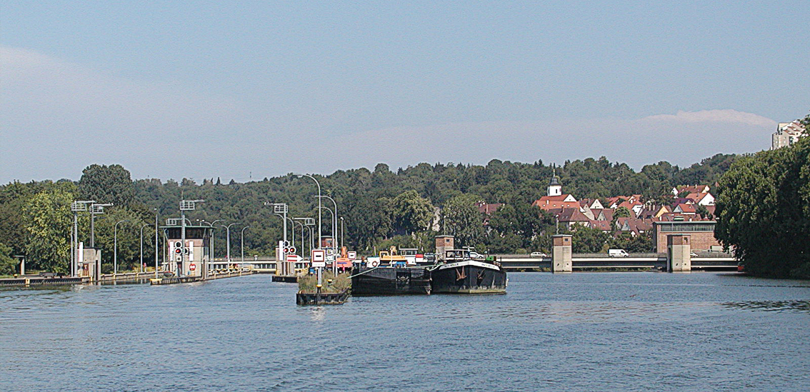 Die Schleuse in Stuttgart Hofen